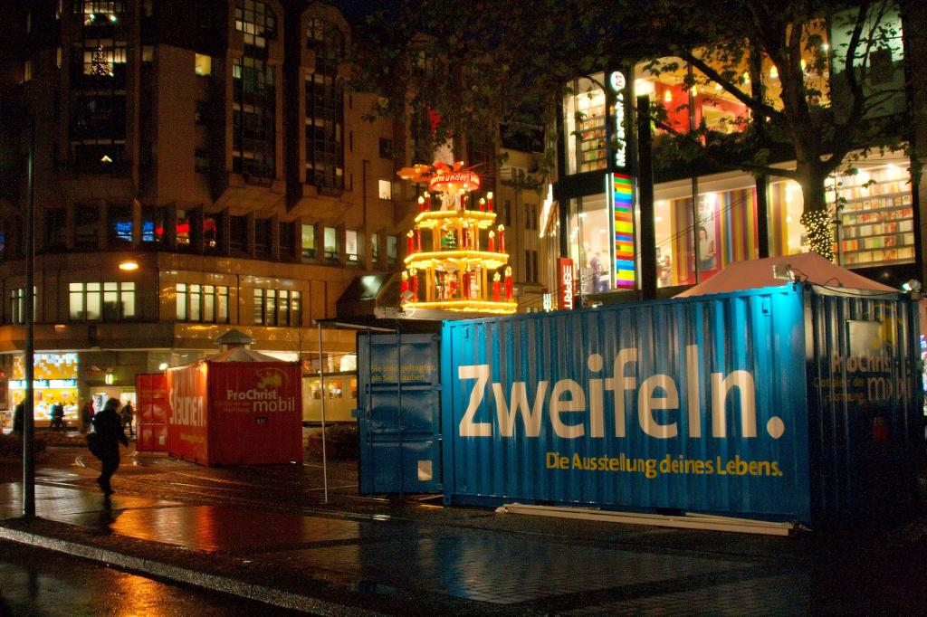 Mobile Missionierungsstation von ProChrist